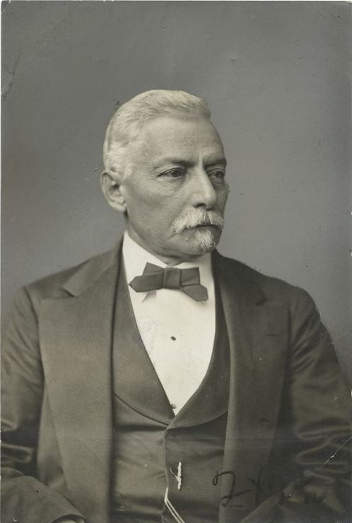 General Pierre G.T. Beauregard